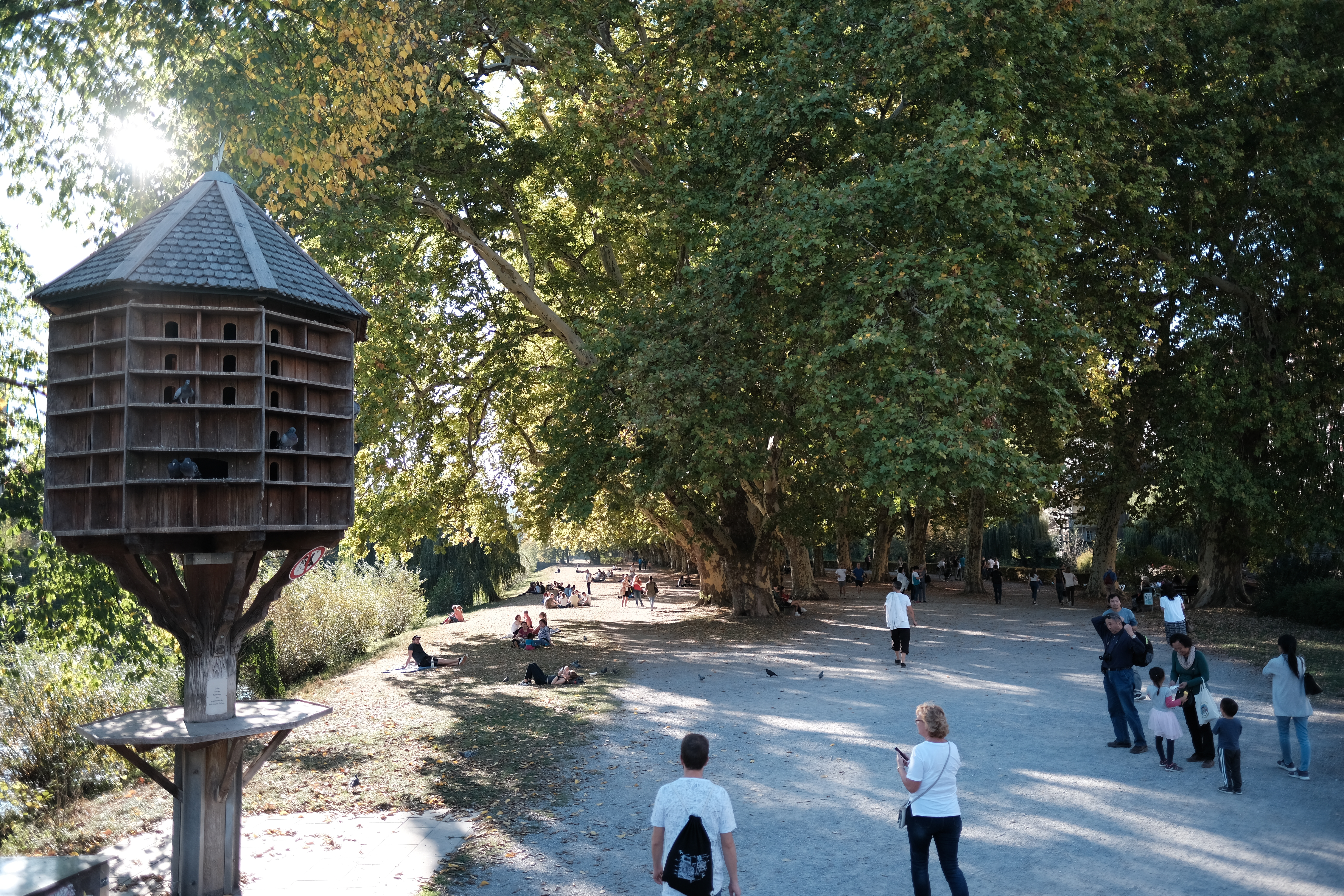 Platanenallee in Tübingen